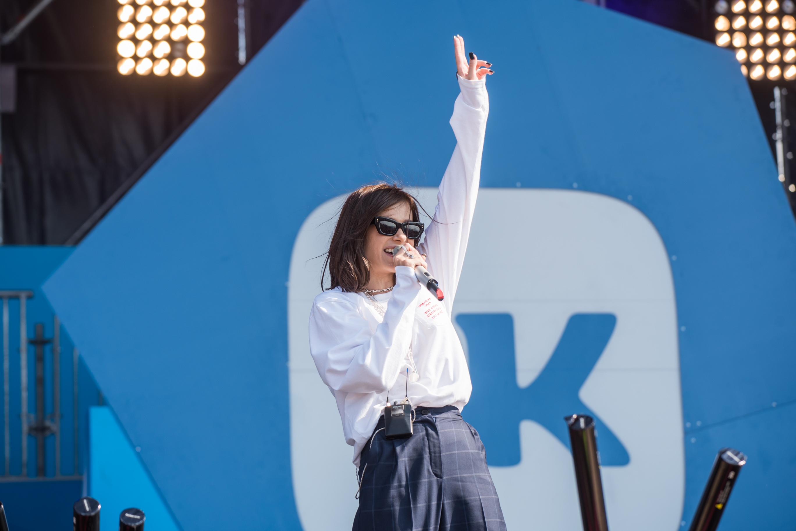 Елена Темникова на VK Fest 2018